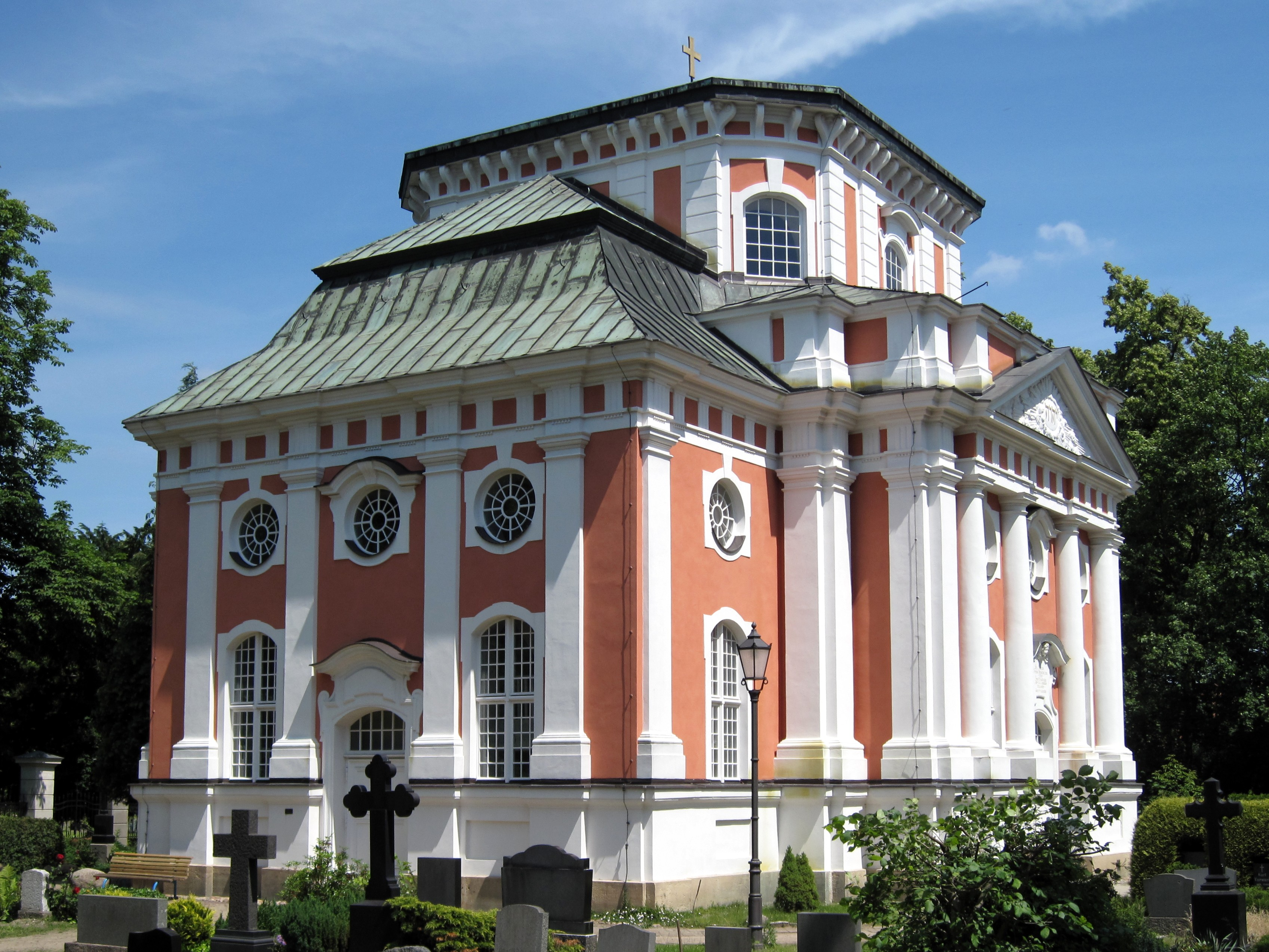 Schlosskirche an der Straße Alt-Buch in Berlin-Buch (Südseite)